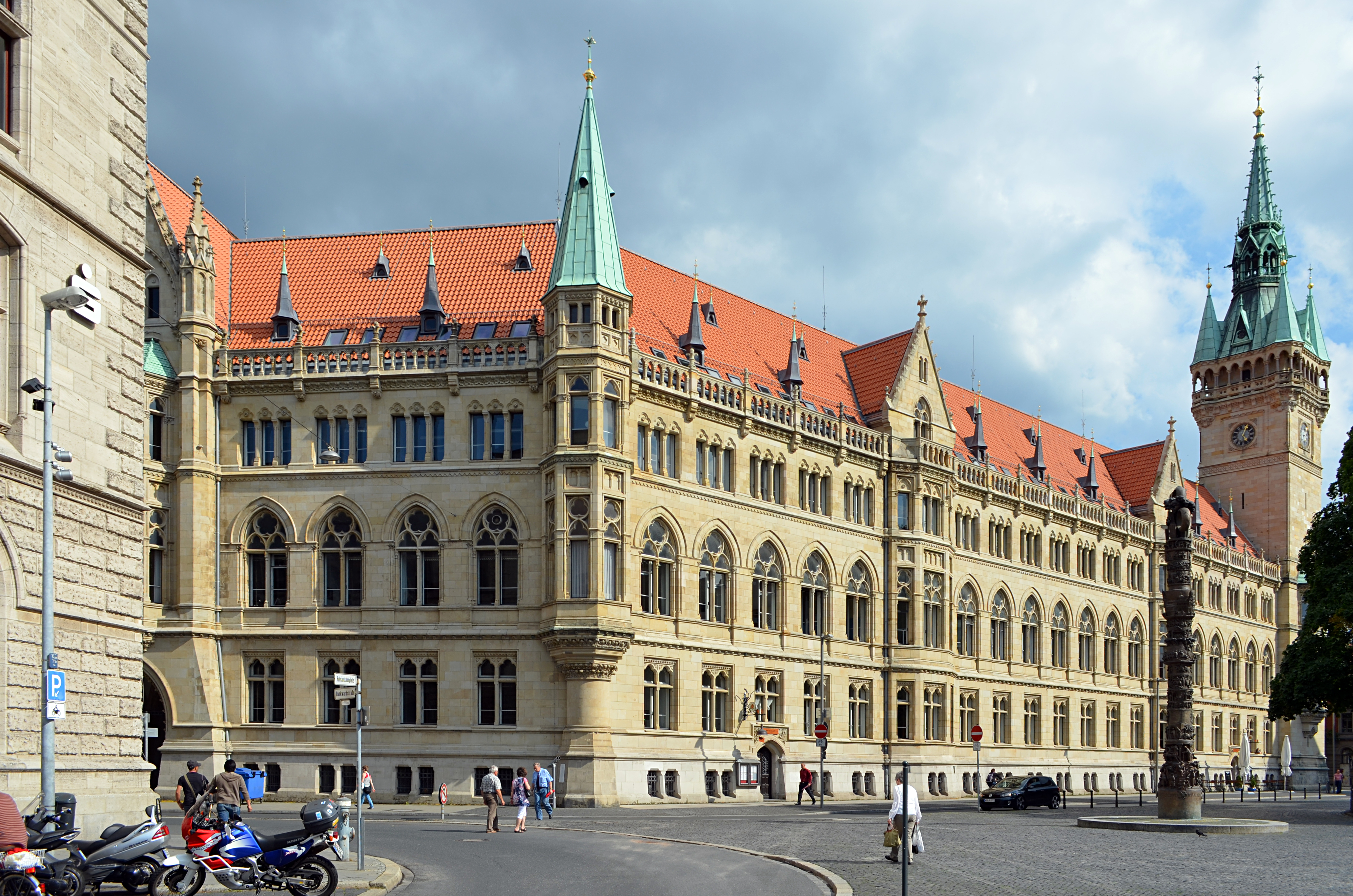 Braunschweig: Rathaus, Westseite